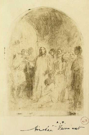 Iisus si femeia adultera, semnata sub cadru cu ştampila de autor, atelierul pictorului, gravură, lucrarea figurează în monografia Nicolae Vermont de Amelia Pavel şi Radu Ionescu, figura 99 reprodusă la pagina 110, 16x9.5cm